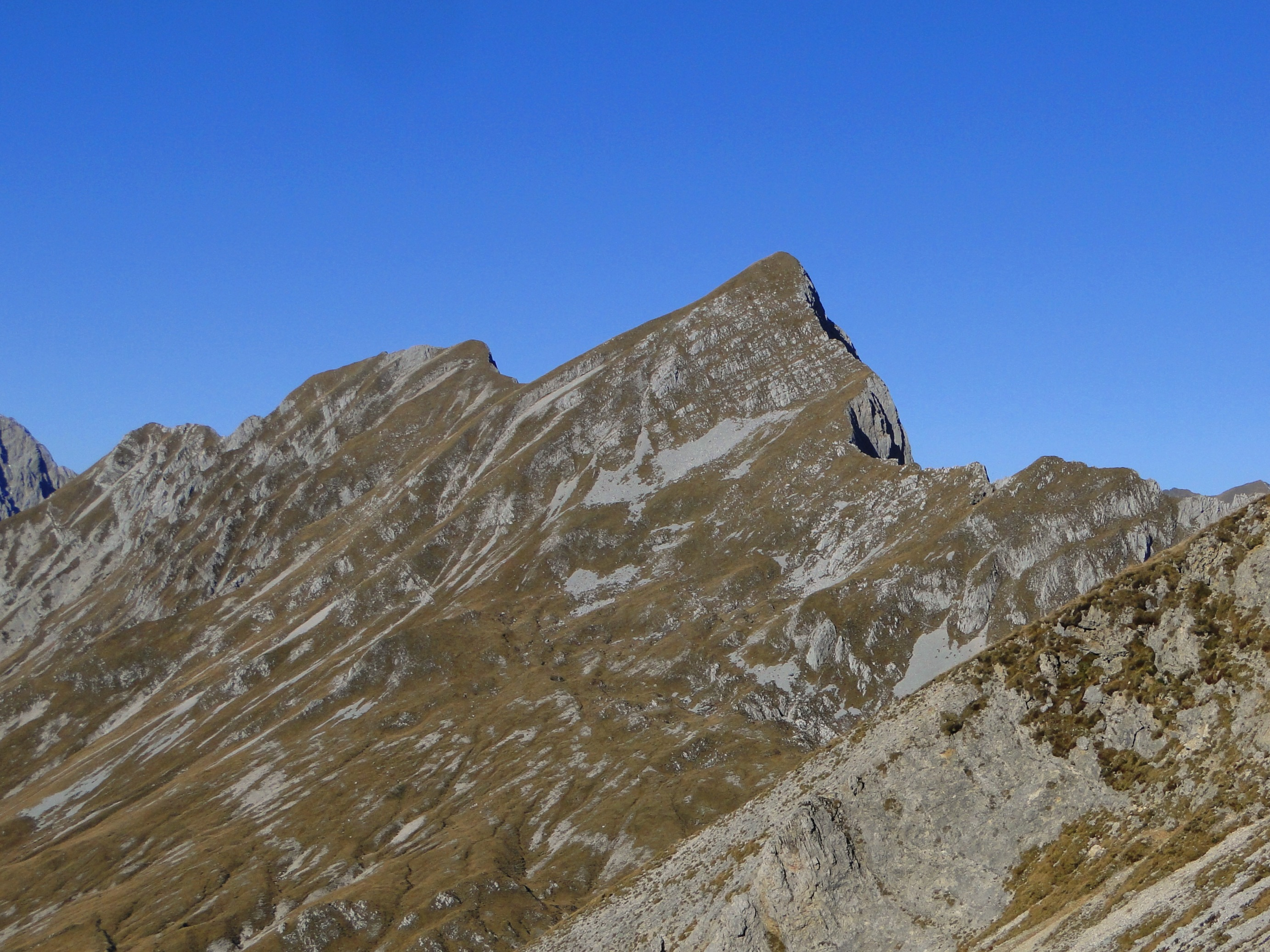 Cima del Fop. Prealpi bergamasche (BG)